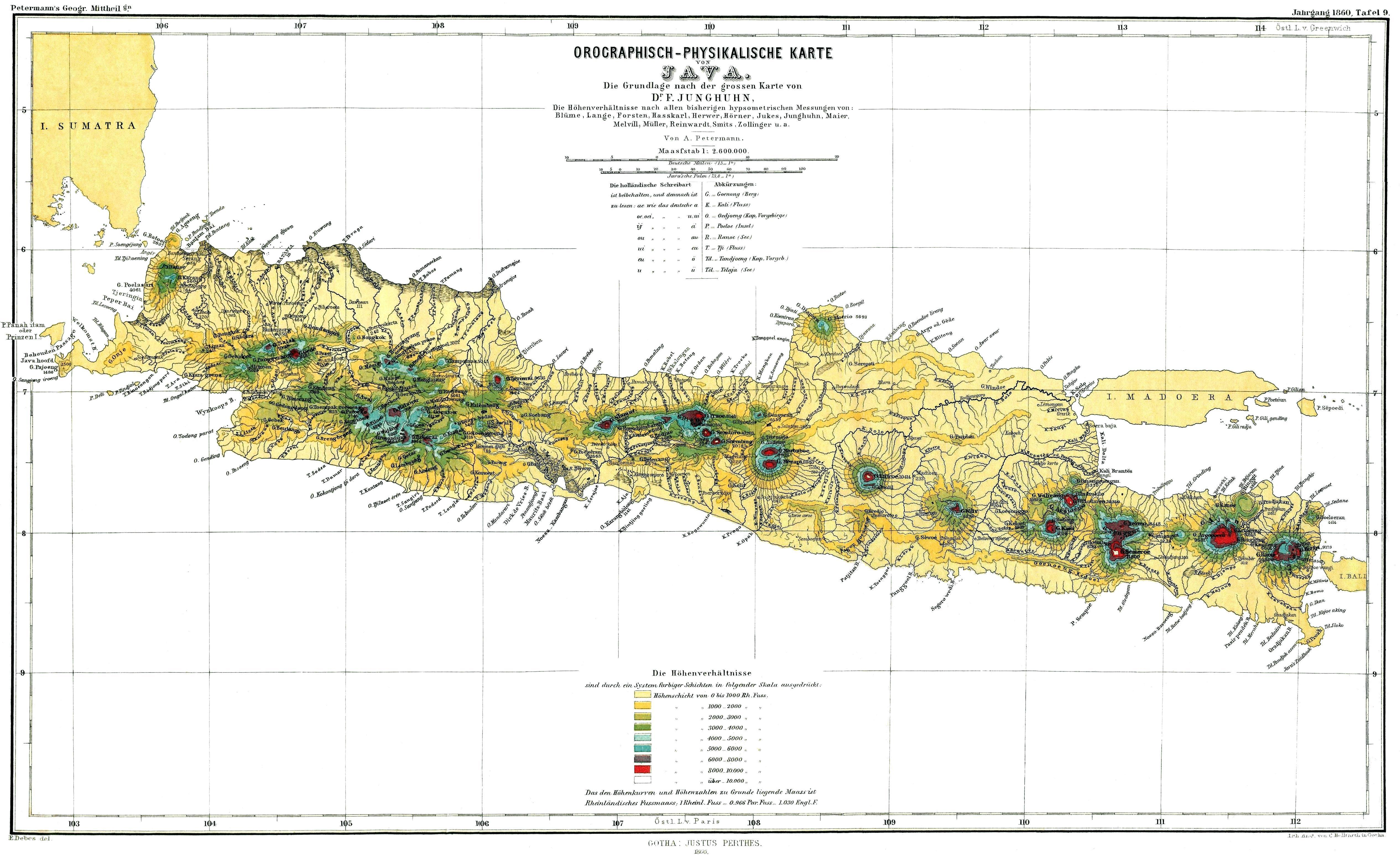 Orographisch-hydrographische Karte von Java